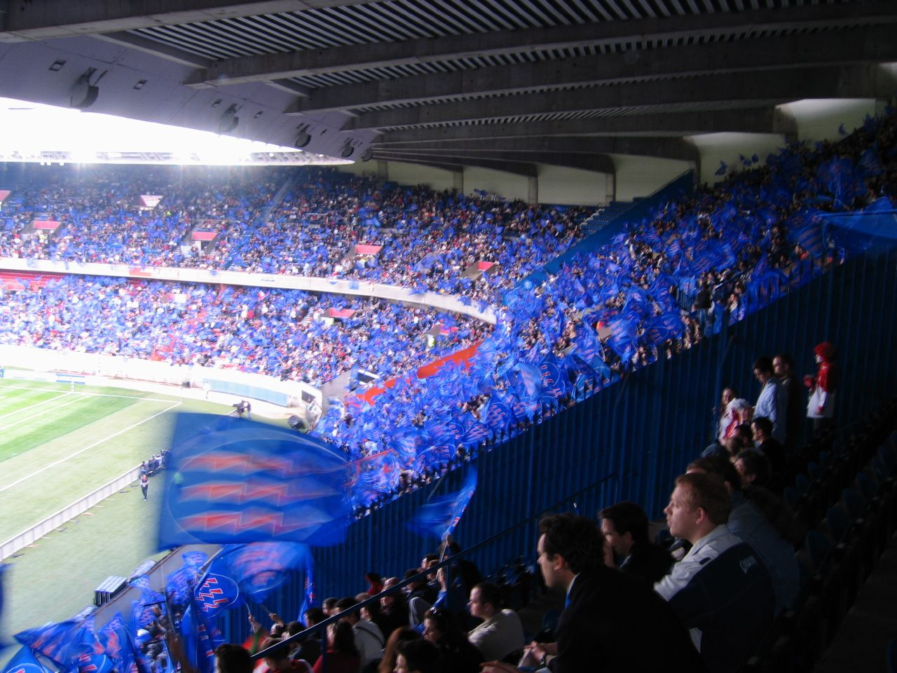 Stade Français Rugby team at Parc des Princes